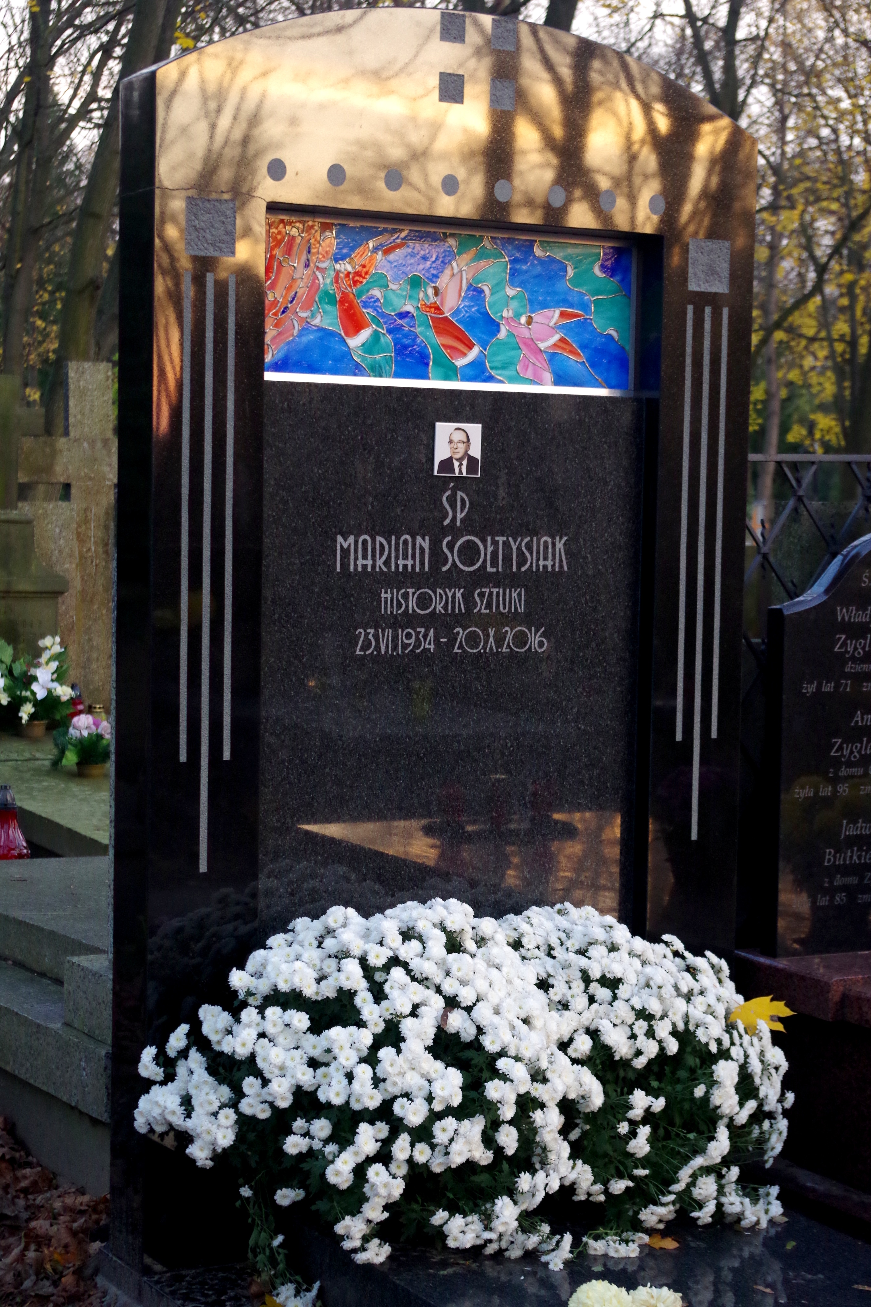 Grób historyka sztuki Mariana Sołtysiaka na Cmentarzu Powązkowskim w Warszawie